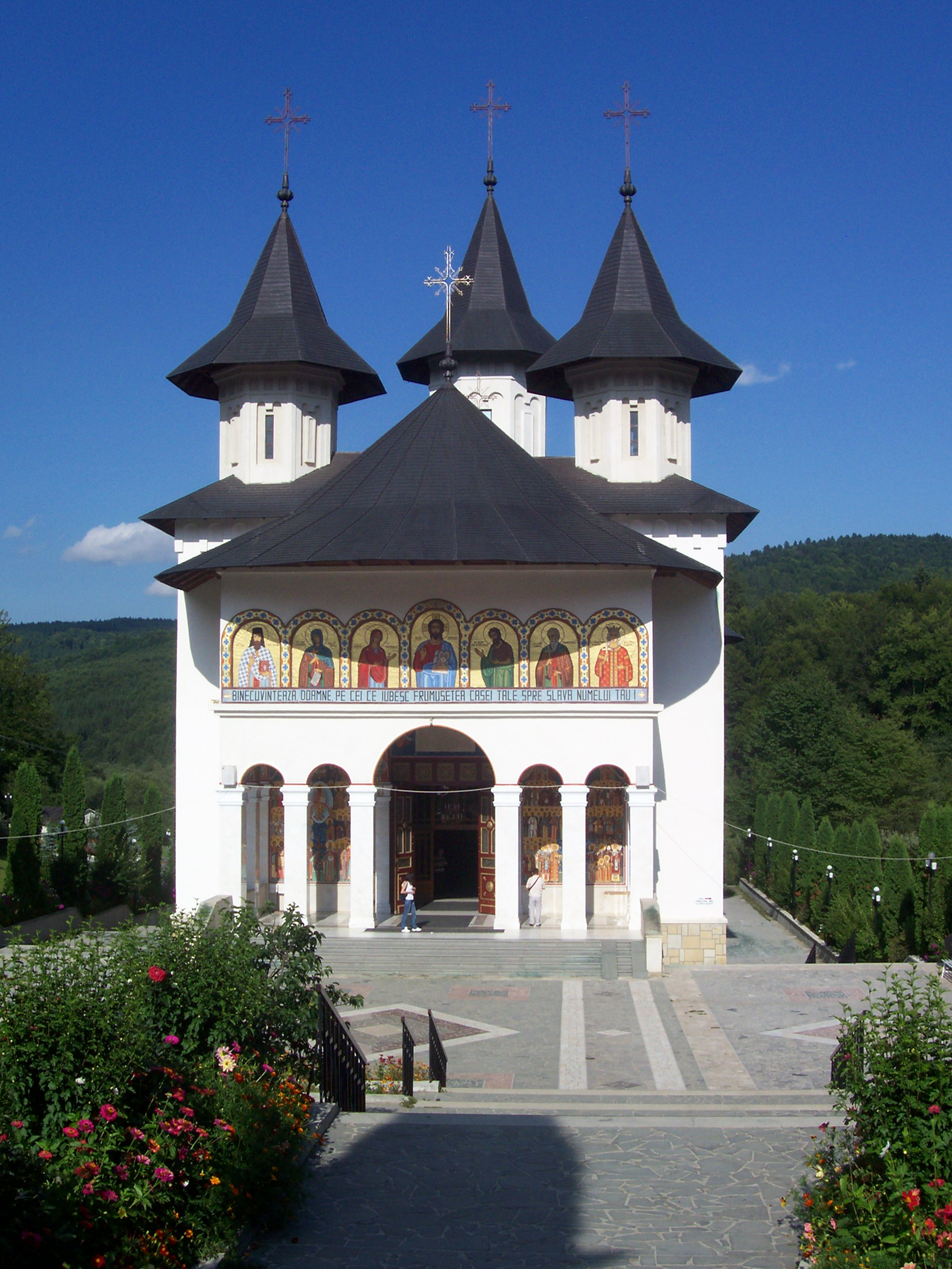 Catedrala "Sf. Theodora de la Sihla"